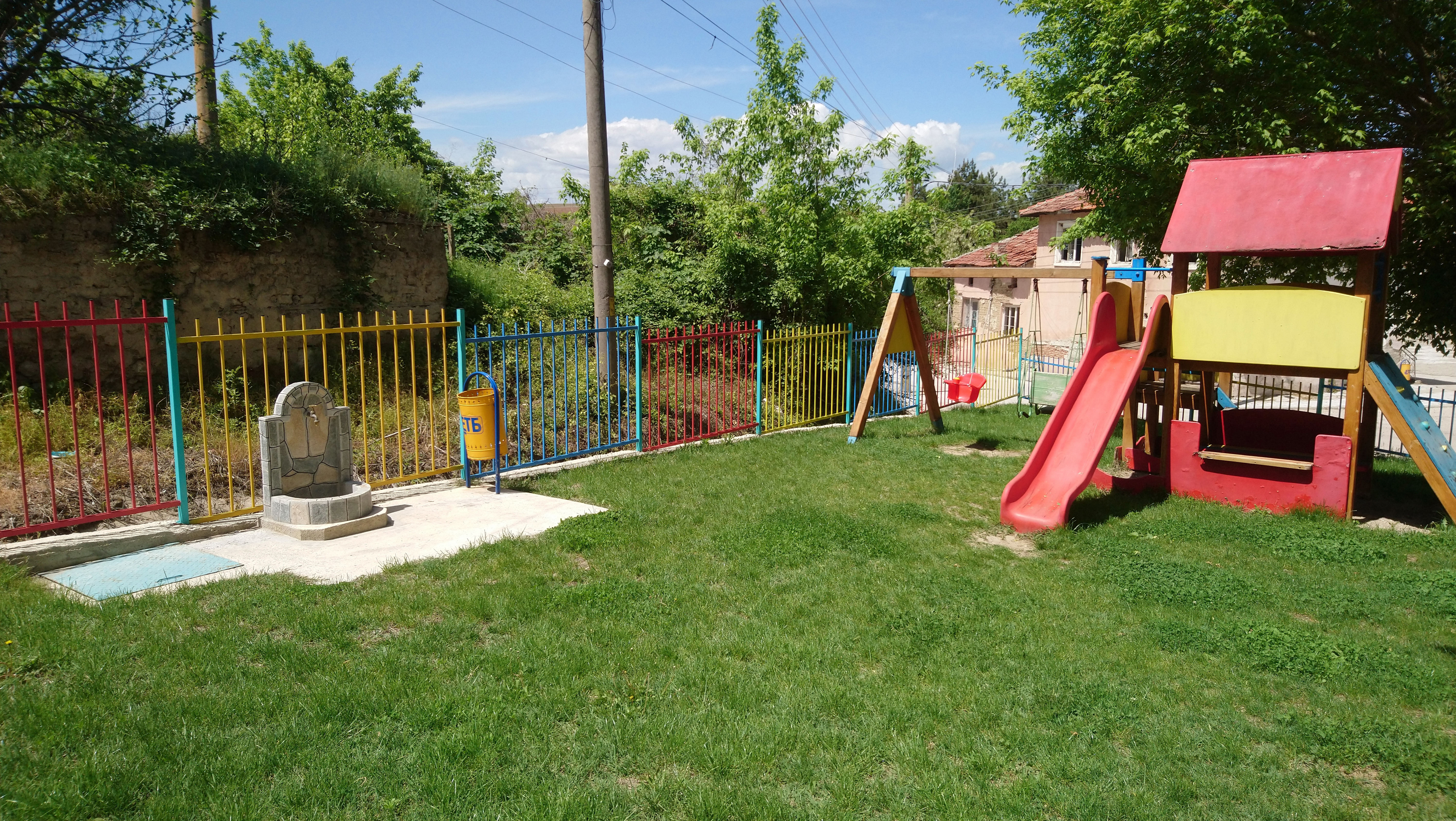 Детската площадка на село Долно Спанчево